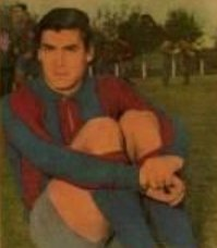 José Albrecht.